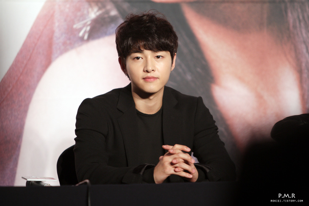 2012년 9월 5일 착한남자 제작 발표회에서.